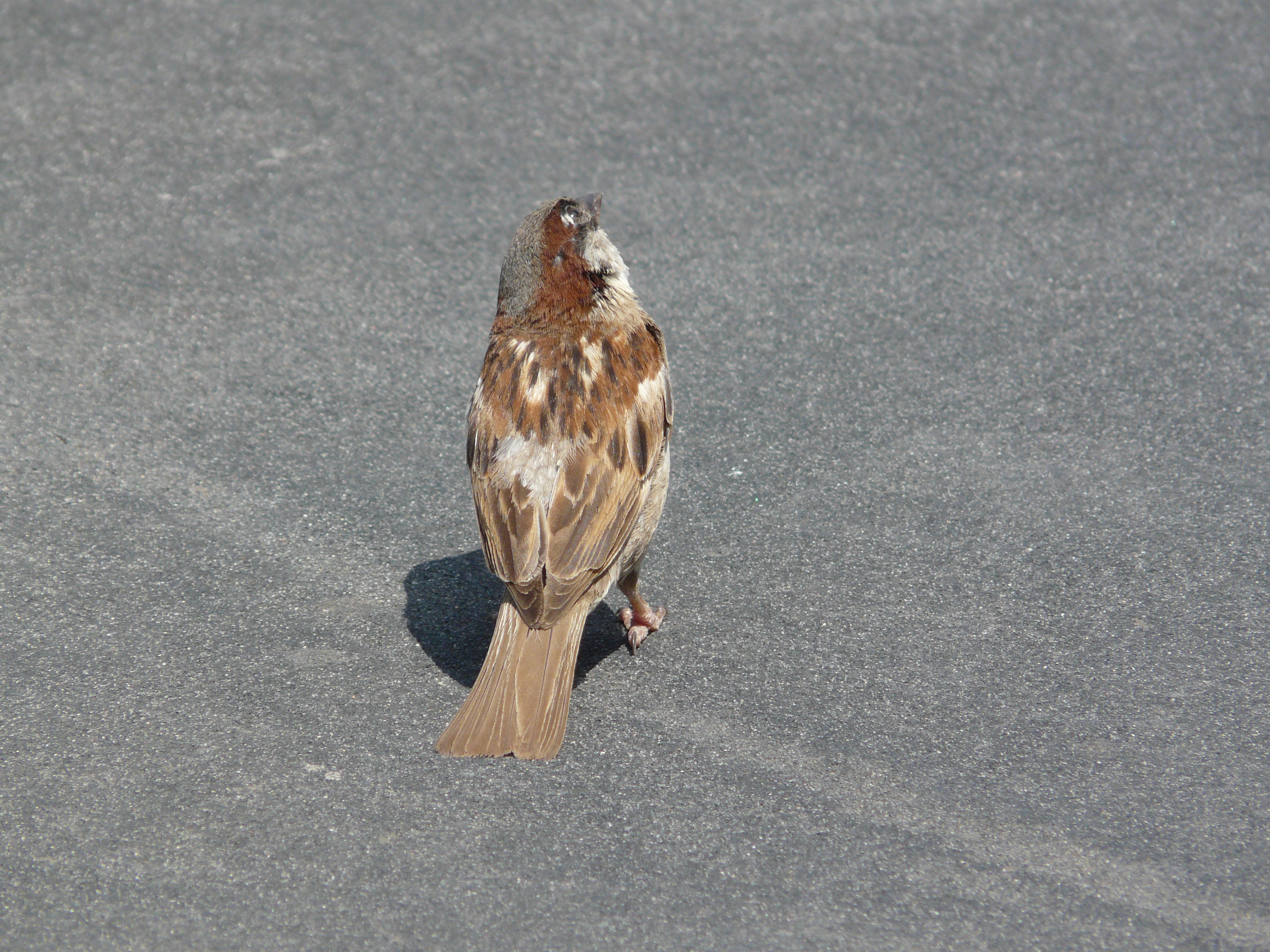 Teuladí (Passer domesticus) a l'Oceanogràfic de València